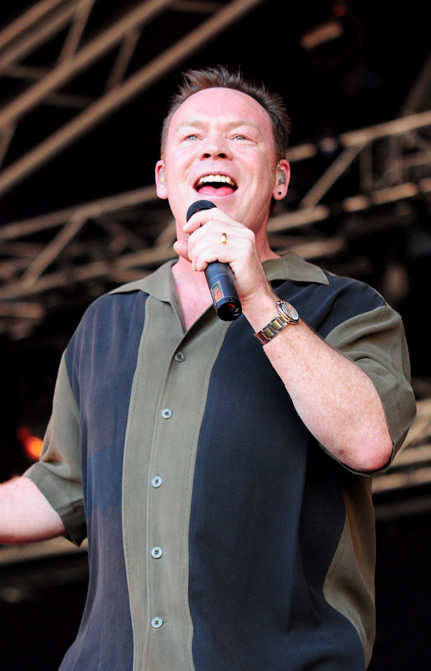 Ali Campbell at Raggamuffin 2009.